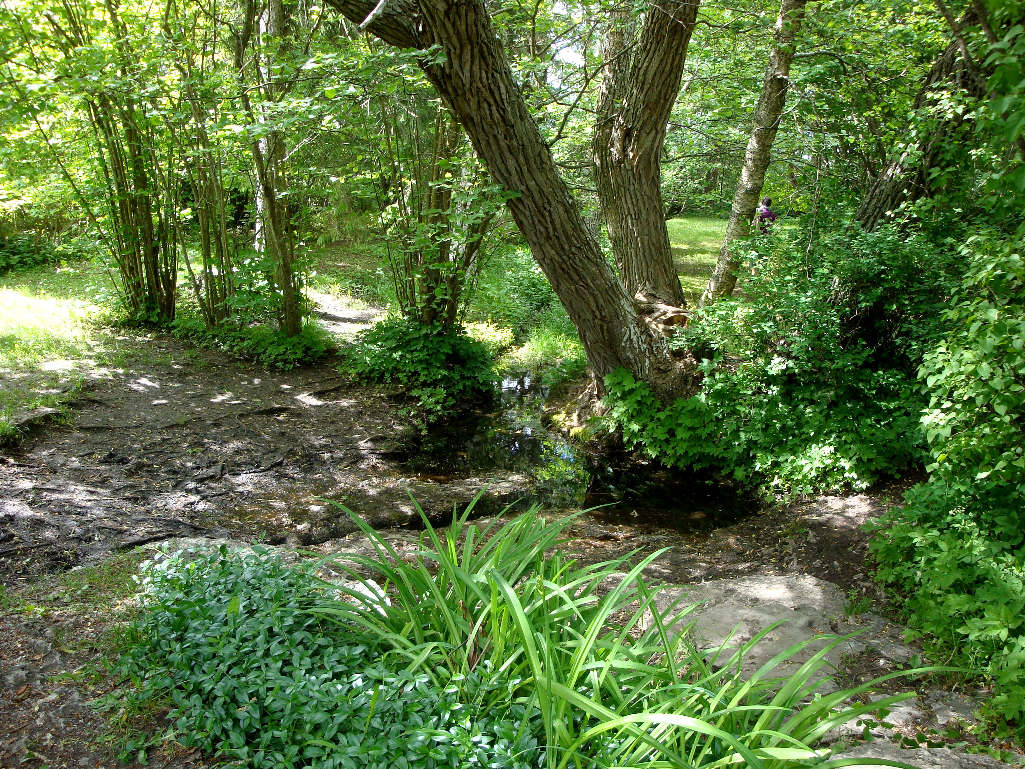 Den blomstertid nu kommer, med lust och fägring stor....” Det sägs att den kända sommarpsalmen skrevs efter inspiration från Hångers källa. På den här svala, lummiga platsen kan du känna samma lugn och ro som Israel Kolmodin när han skrev de kända raderna. Källans lugna porlande och de lummiga träden skapar här ett rofyllt rum i naturen.